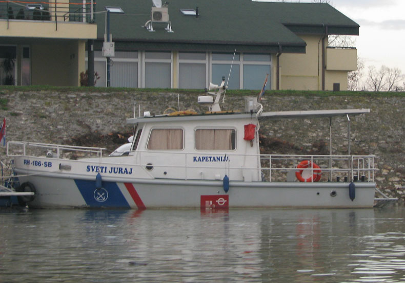 Brod Kapetanije u Slavonskom Brodu